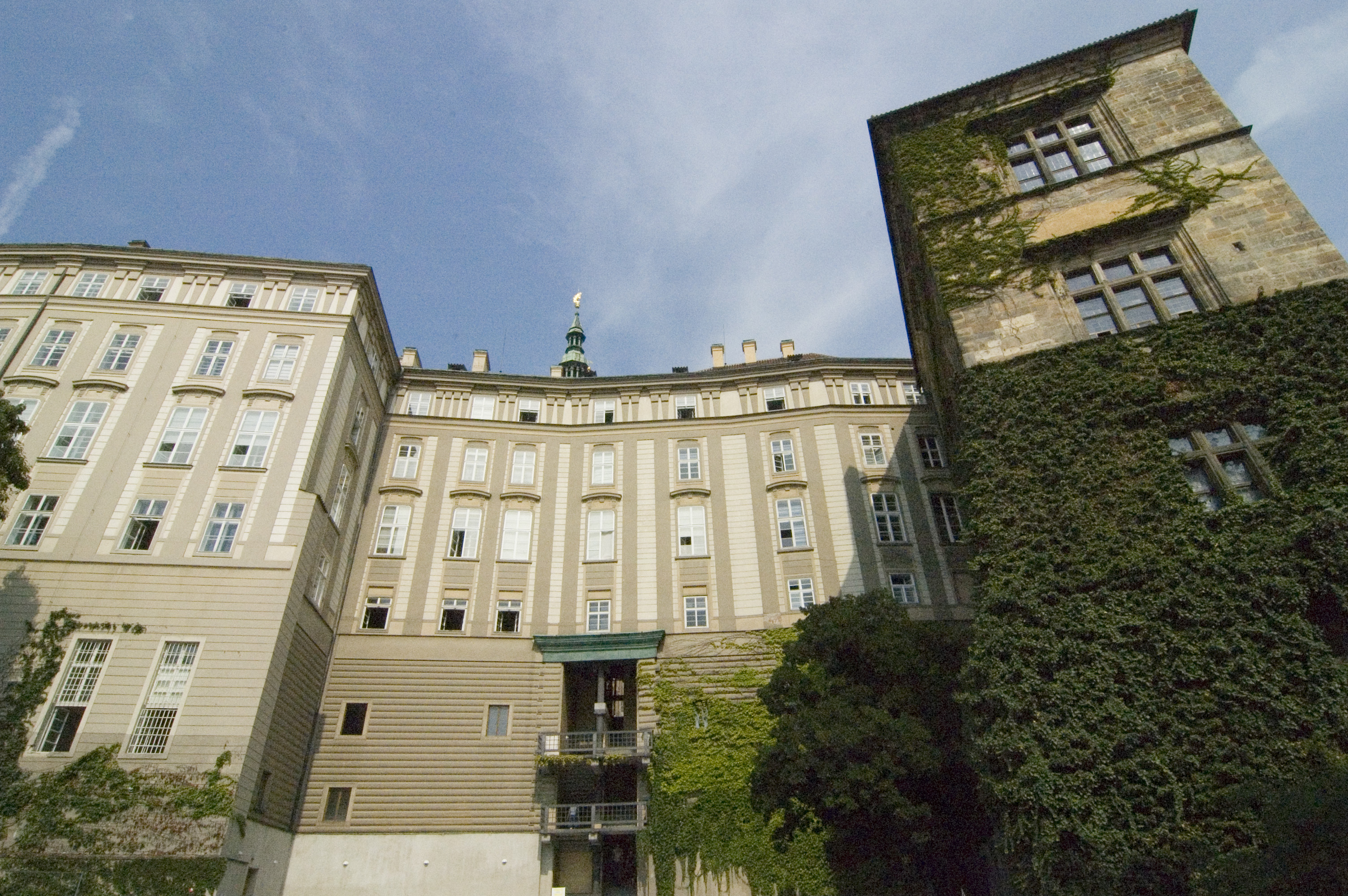 Pražský hrad, předěl mezi Novým královským palácem (vlevo) a Ludvíkovým křídlem Starého královského paláce (vpravo), pohled ze zahrady Na Valech